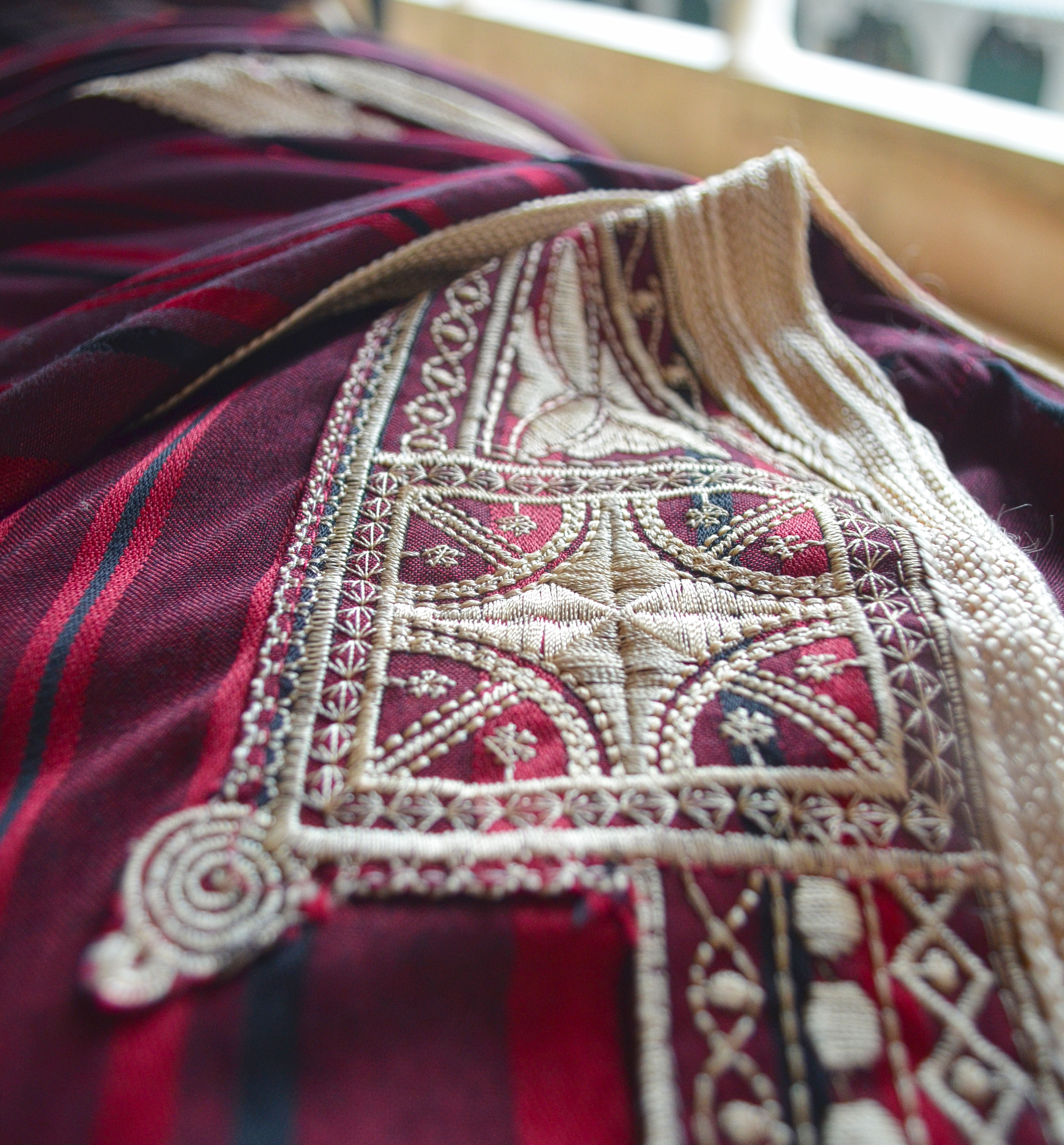 Détails d'une Jebba Tunisienne de couleur bordeaux. This is an image of Cultural Fashion or Adornment from Tunisia